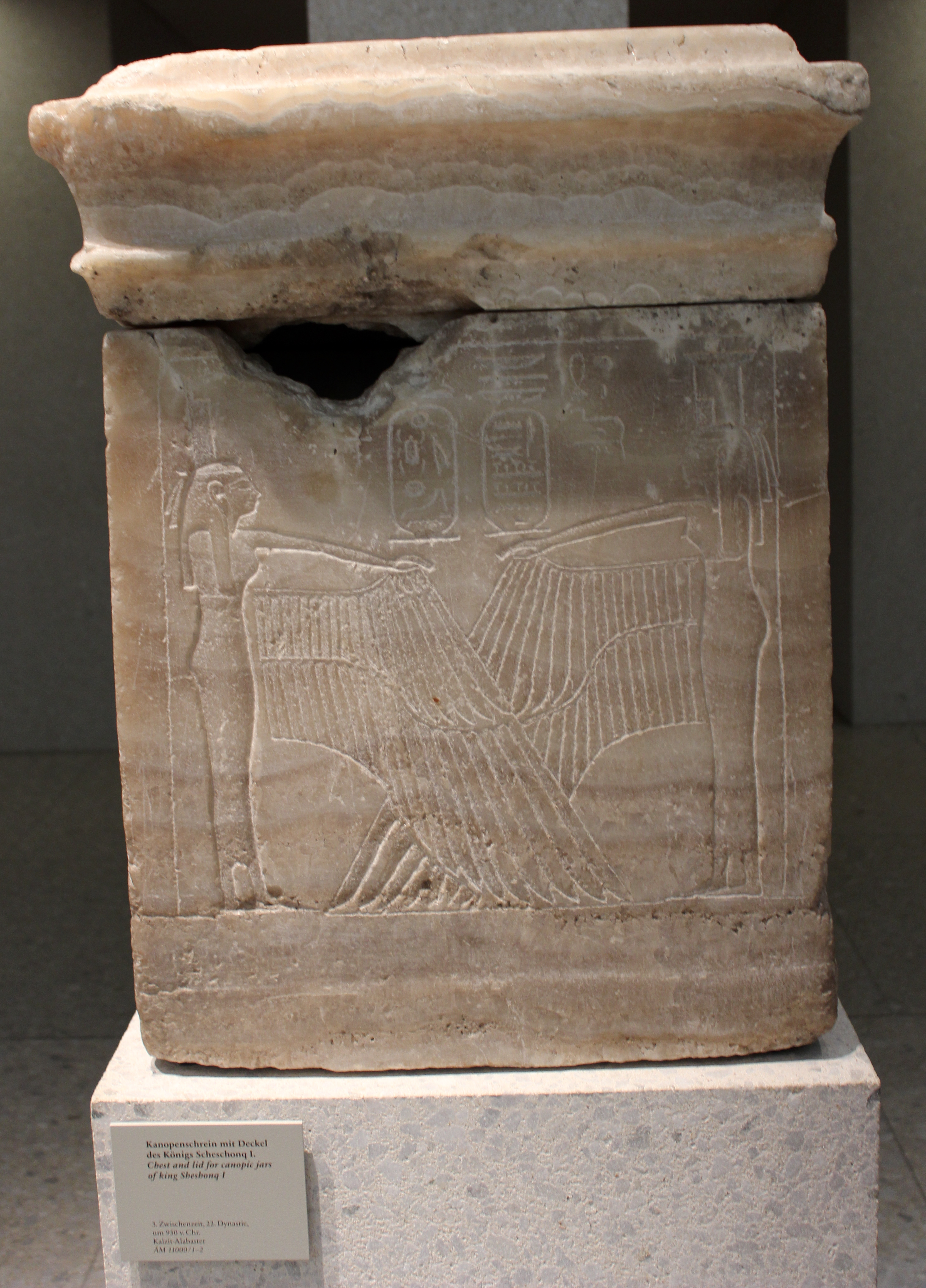 Berlín, Neues Museum. Caja para los vasos canopes de Sheshonq I.